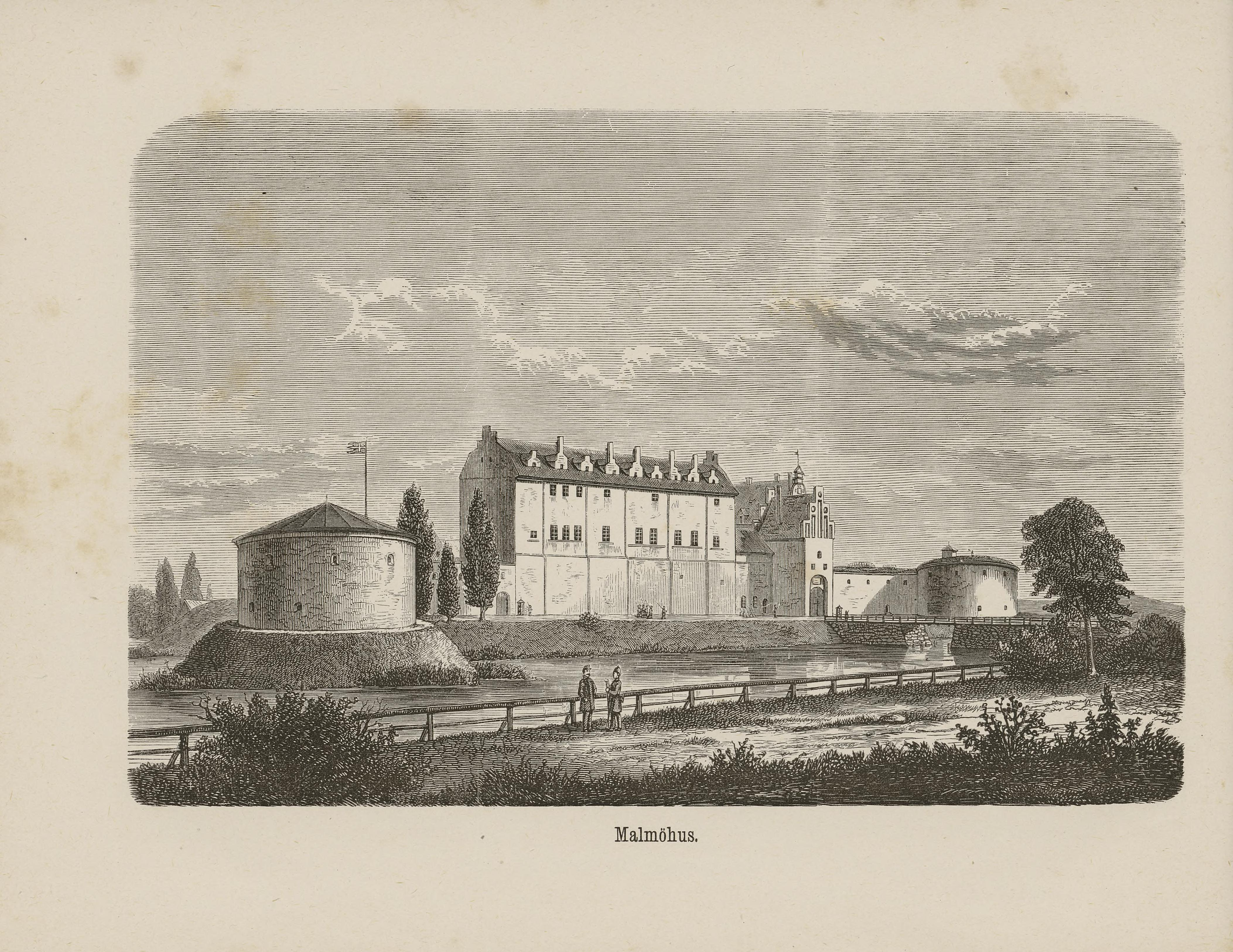 Illustrasjon hentet fra boken Nordiska taflor av ukjent forfatter og utgitt av Albert Bonnier (se, 1865)